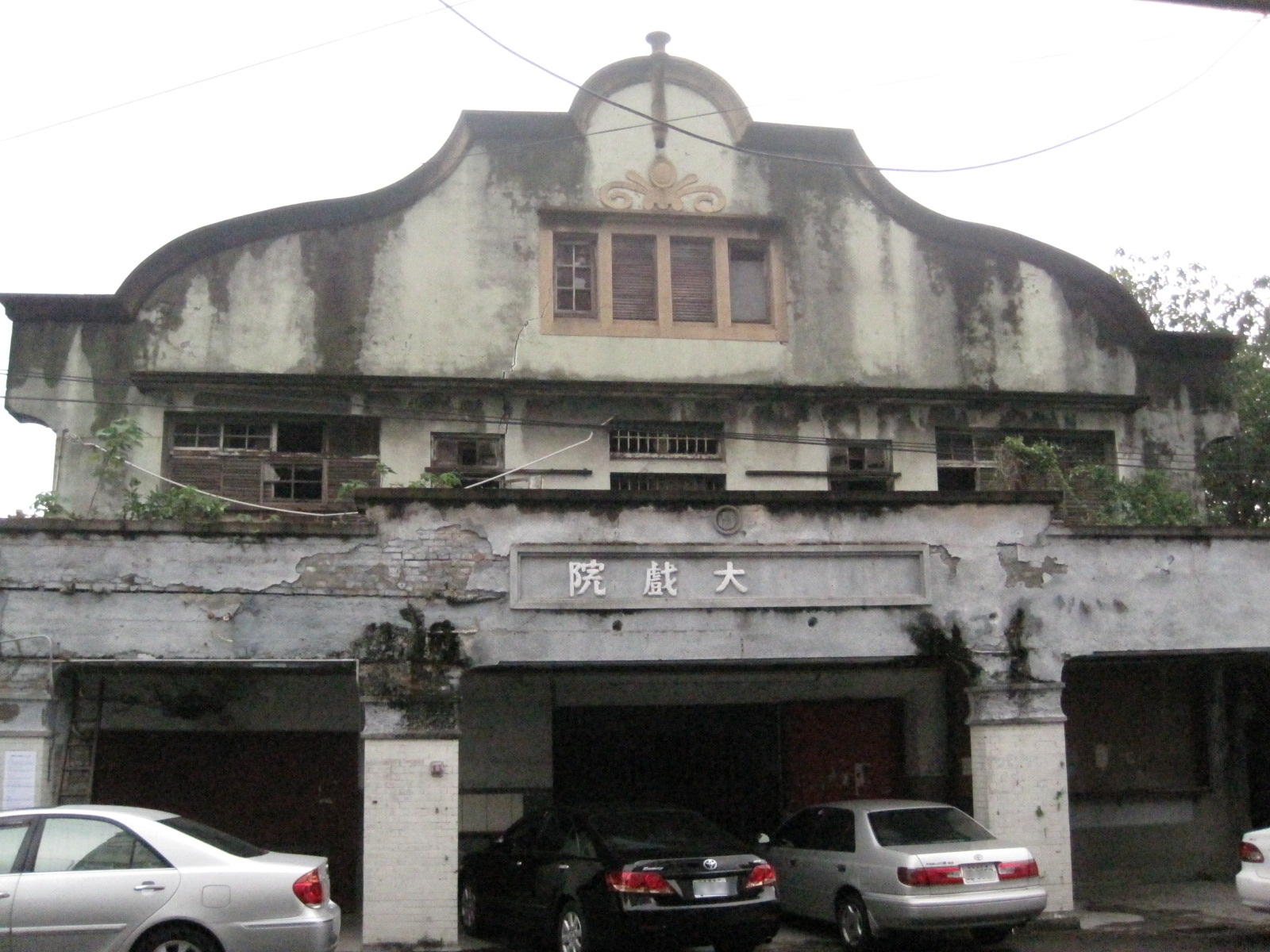 位於西螺的西螺戲院。